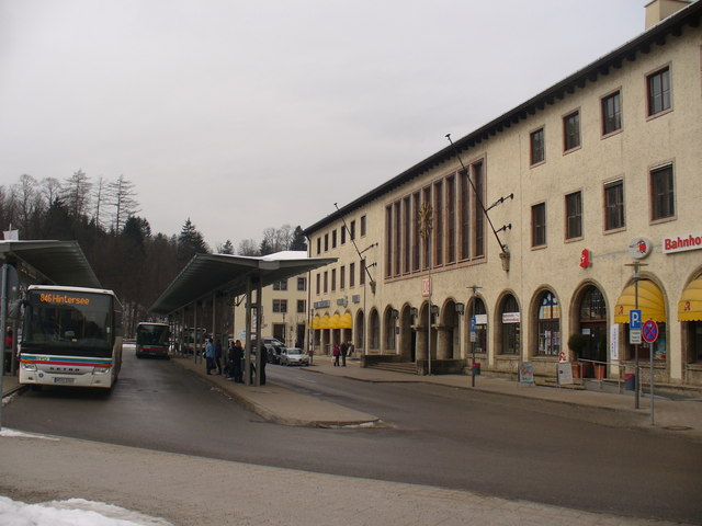 Haupt-Bahnhof Berchtesgaden (Berchtesgaden Main Station)